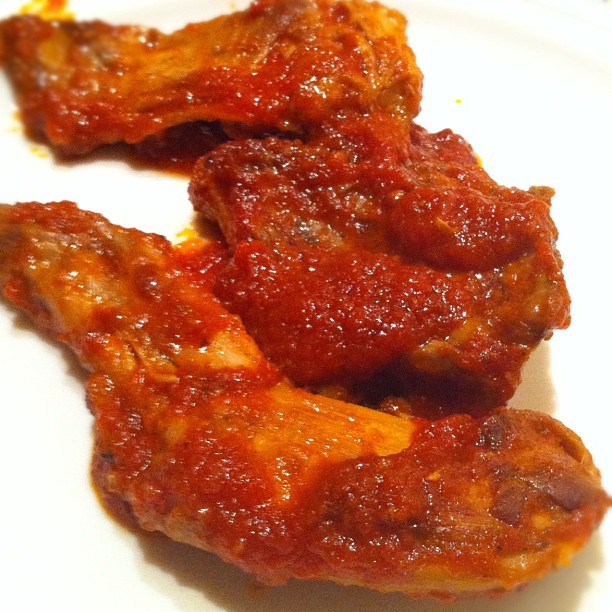 Conejo campero con tomate.